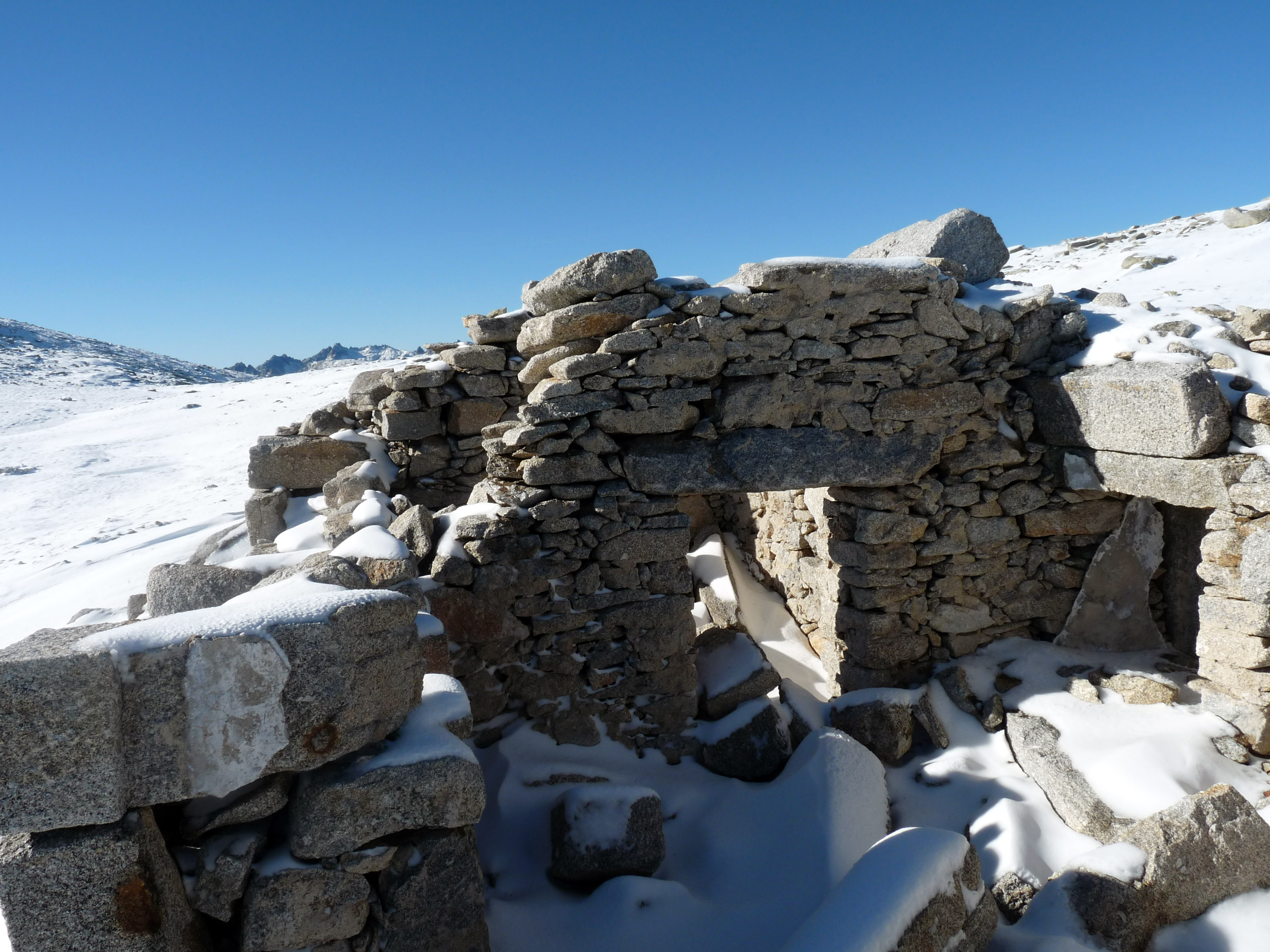 Refugio en ruinas de los Pelaos, cerca del Pico de la Mira, en la Sierra de Gredos, España.